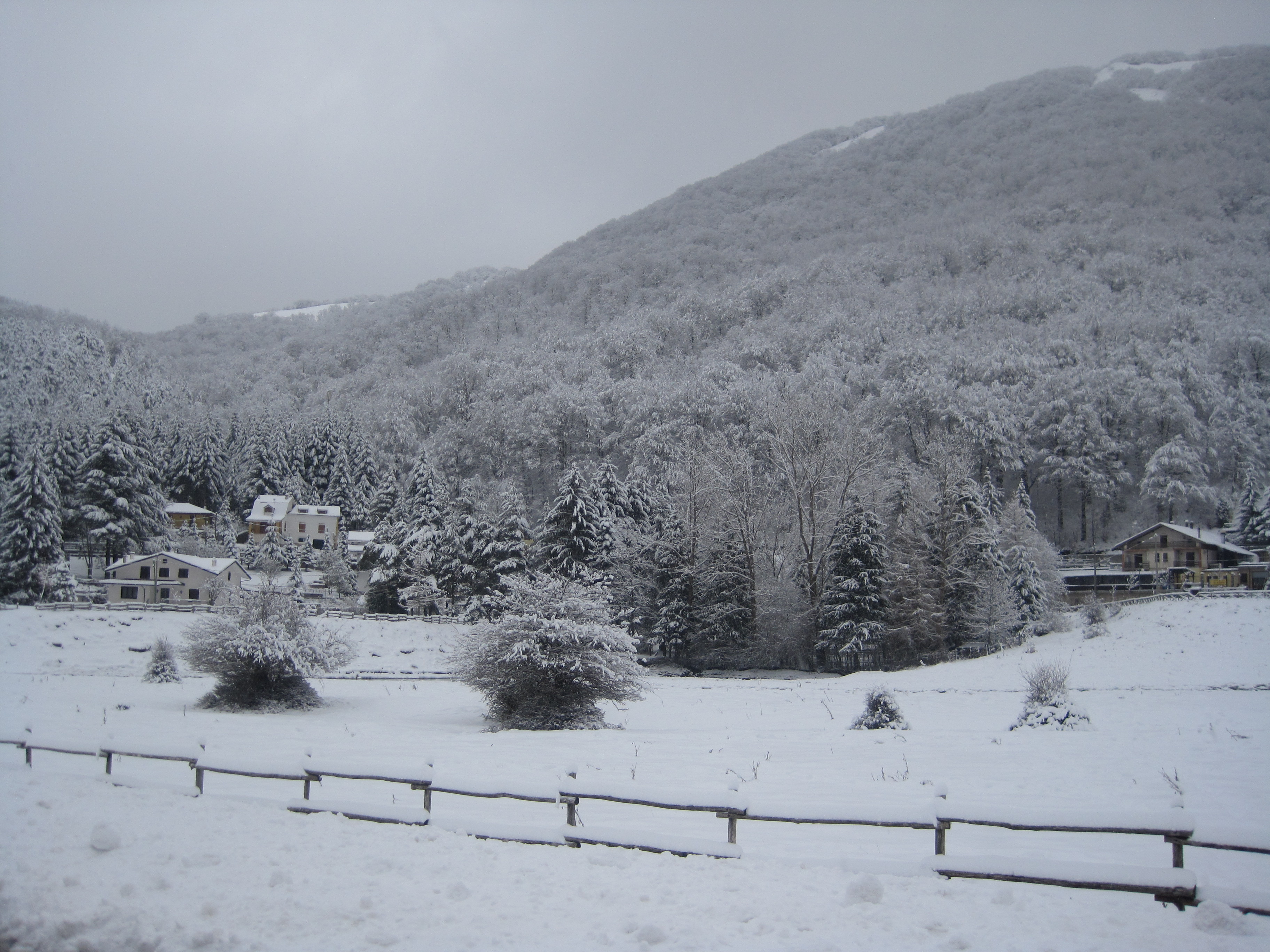 Foto scattata da me nel 2011 a seguito delle nevicate di fine Gennaio